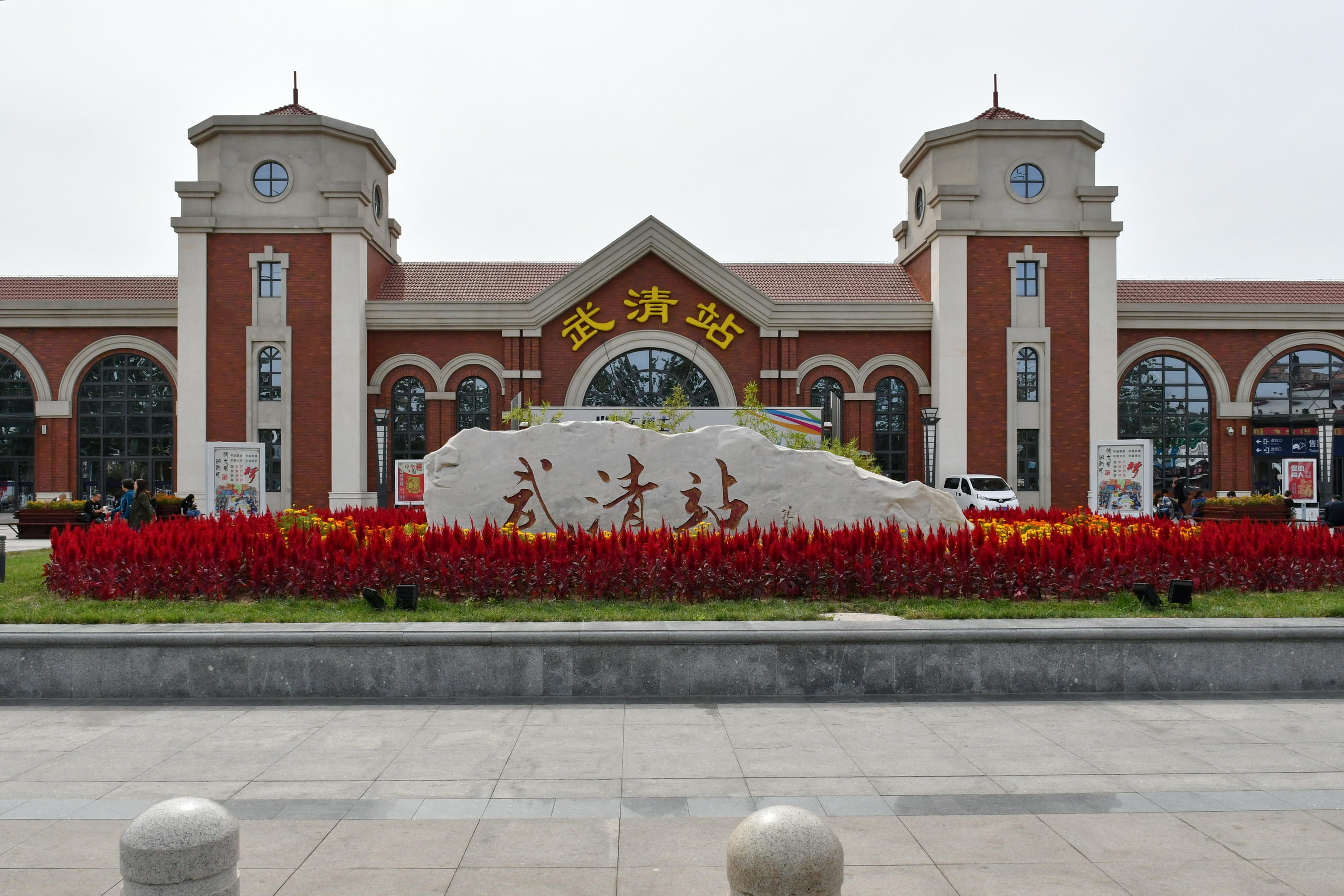 京津城际铁路武清车站。